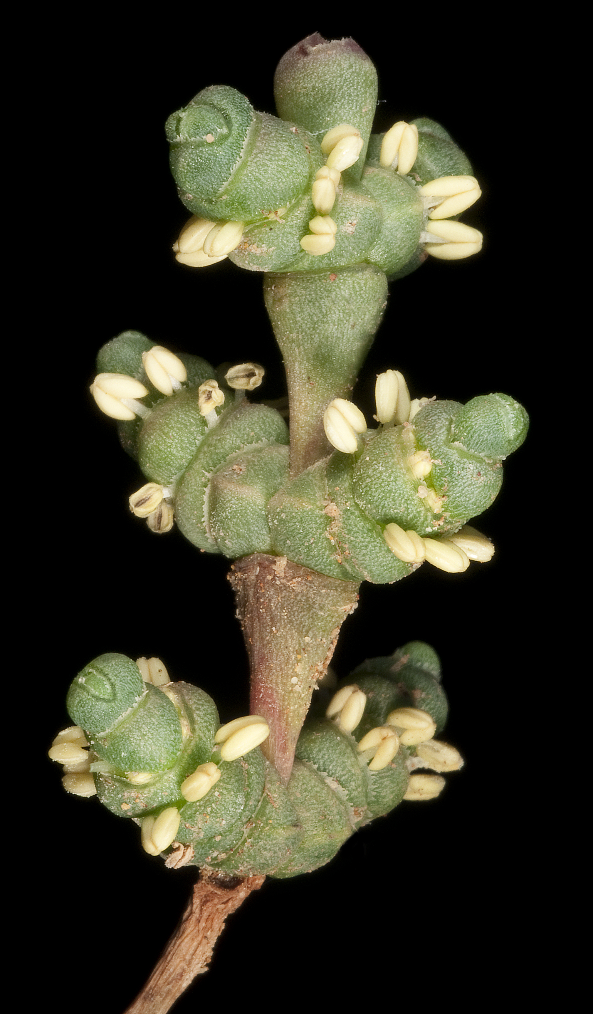 KRT4330